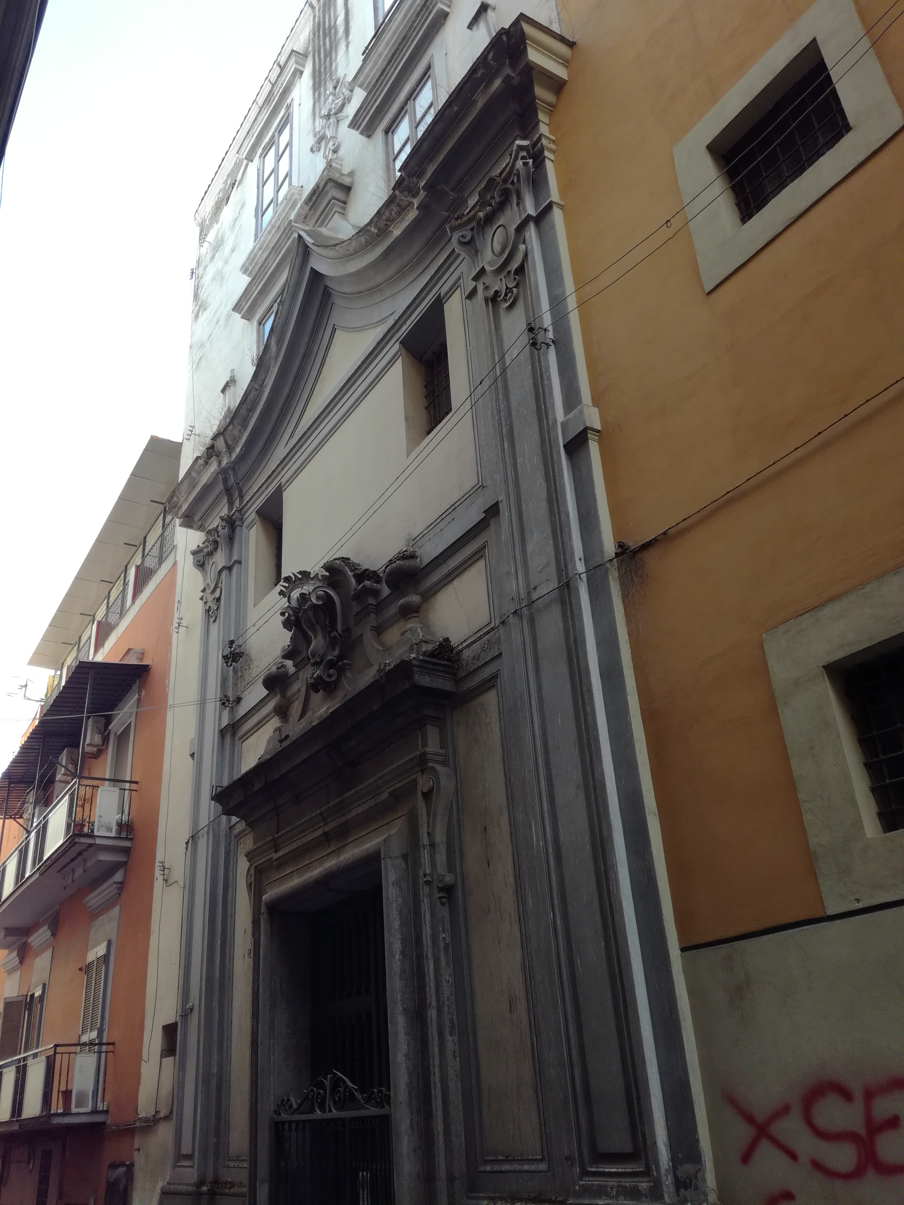 Complesso delle Periclitanti